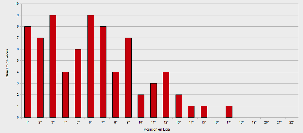 Posiciones en liga del Athletic Club.